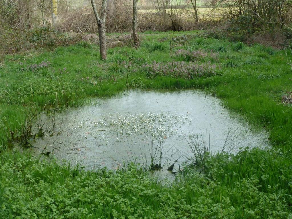 Pazos de Codosedo, Sarreaus